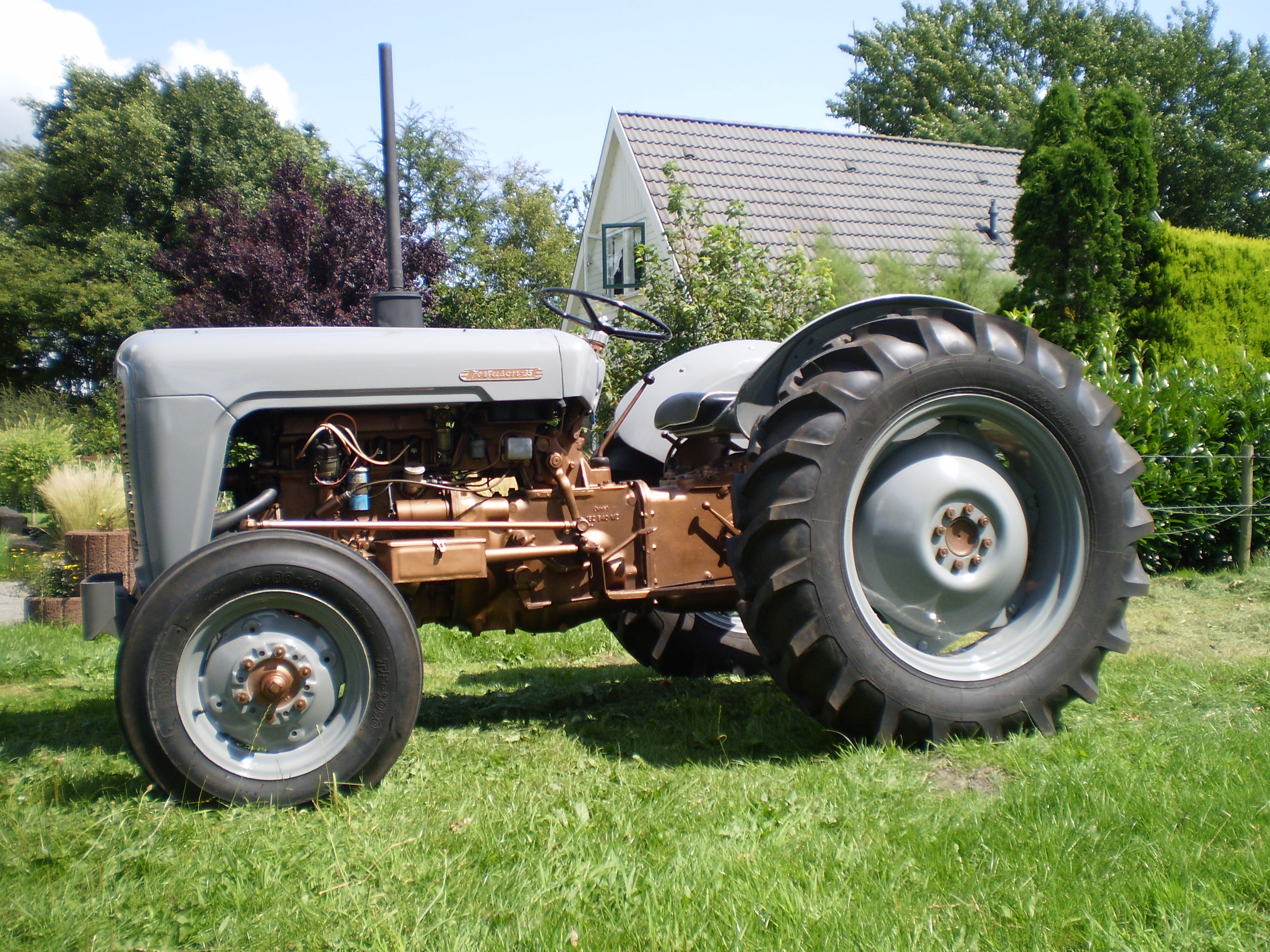 Massey Ferguson FE 35 – Oanbean troch Swarte Kees op 30 july 2009